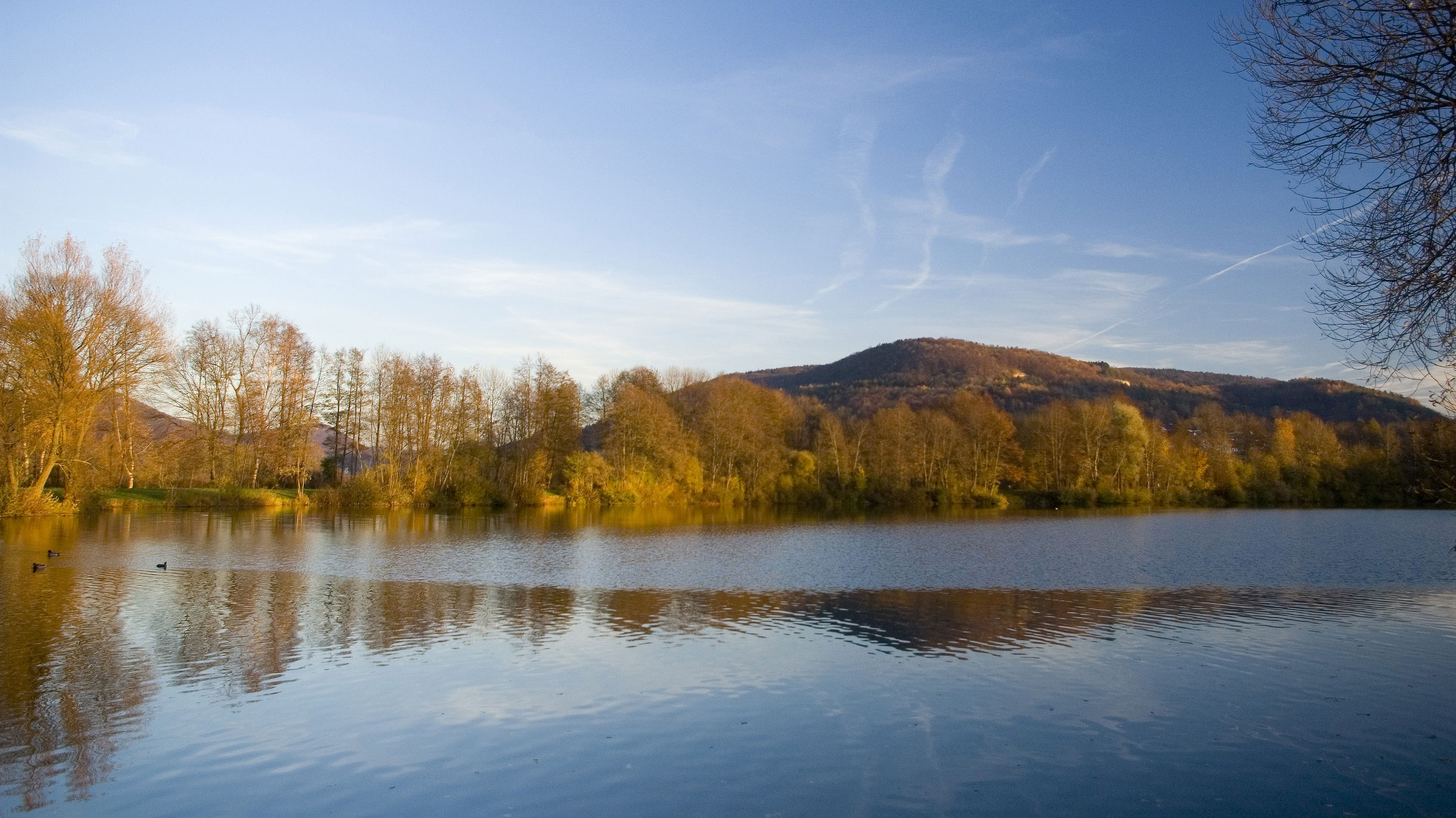 Baggersee